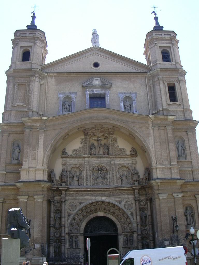 Zaragoza - Basílica de Santa Engracia - Renacimiento, primera mitad del siglo XVI.